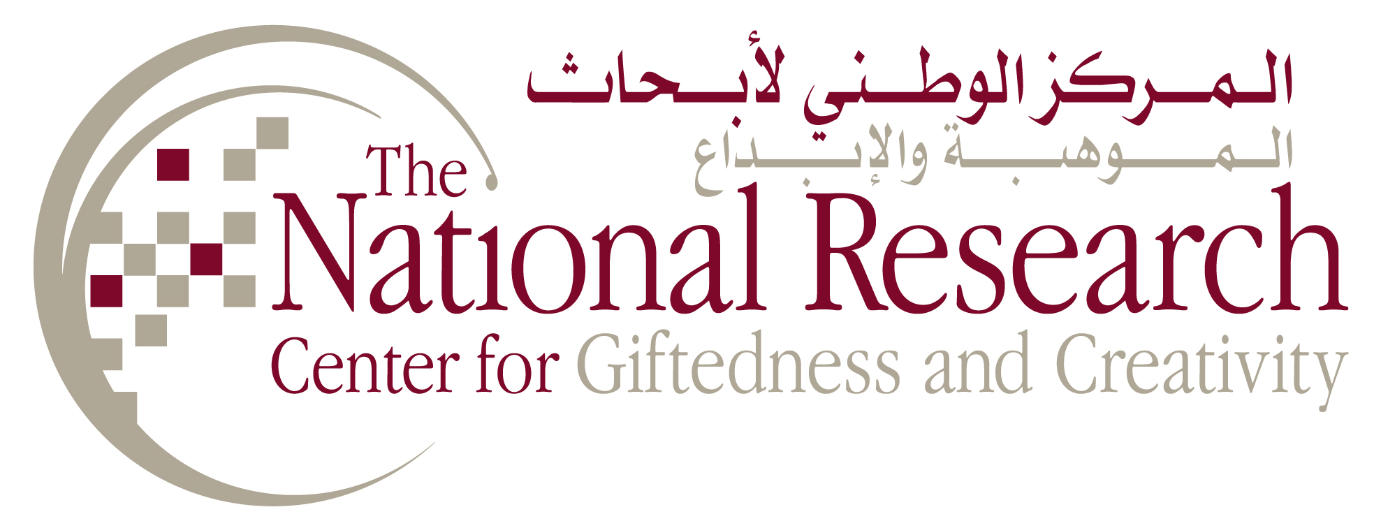 هذا اللوغو خاص بالمركز الوطني لأبحاث الموهبة والإبداع